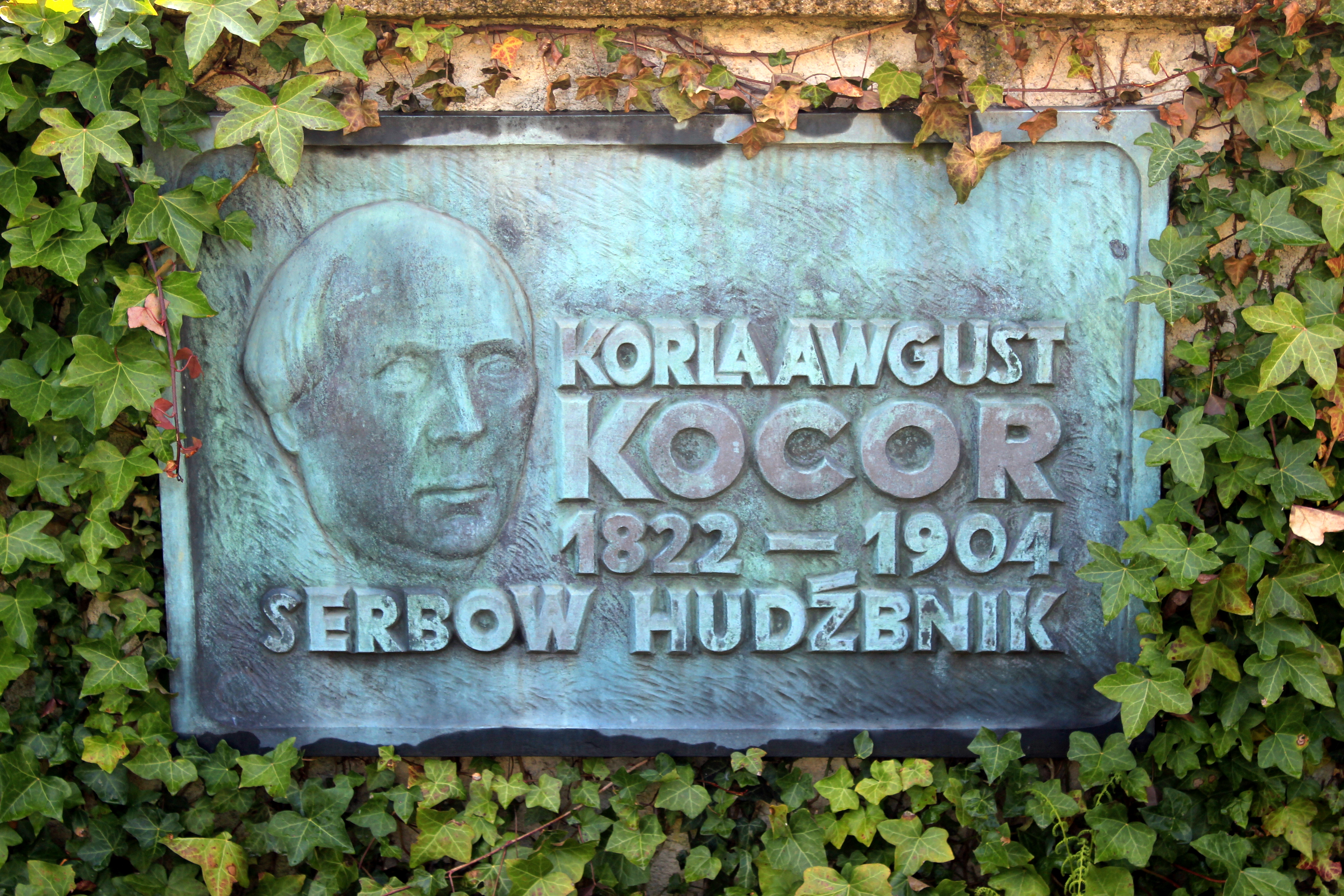 Hornjoserbsce: Row Korle Awgusta Kocora na Ketličanskim kěrchowje.